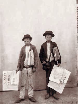 Vendedores de jornal no Rio de Janeiro fotografados por Marc Ferrez.